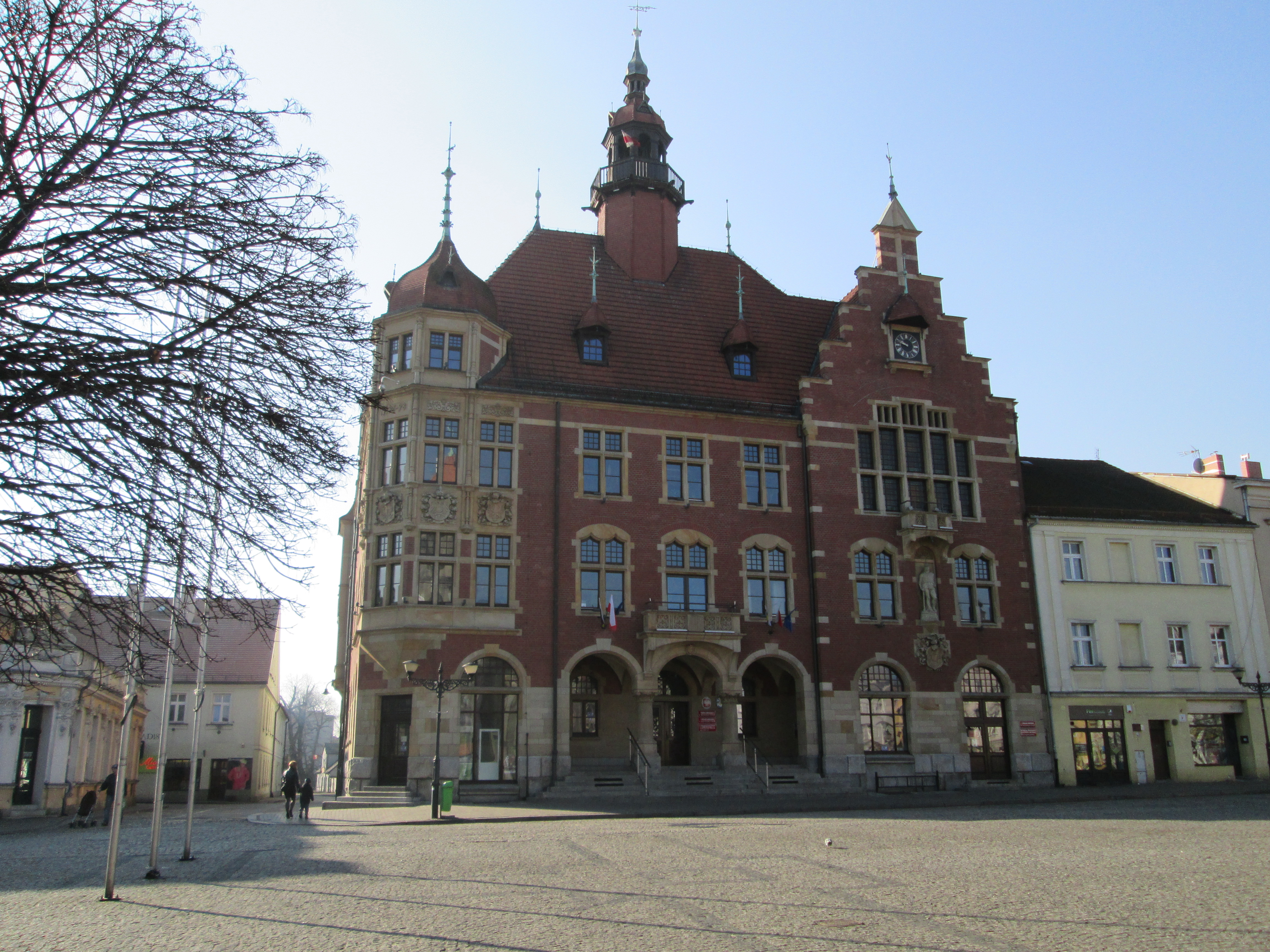 Tarnowskie Góry, ratusz, 1896-1898